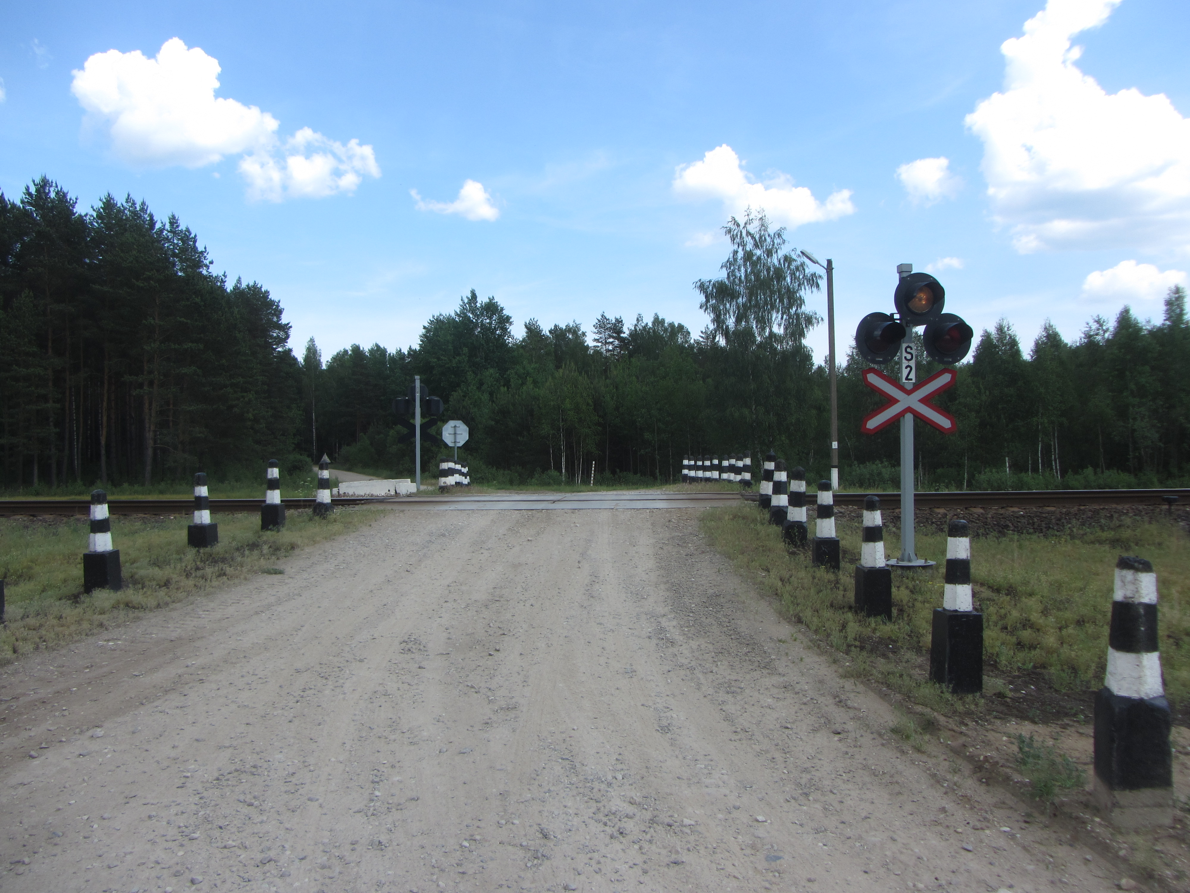 Ruklos sen., Lithuania